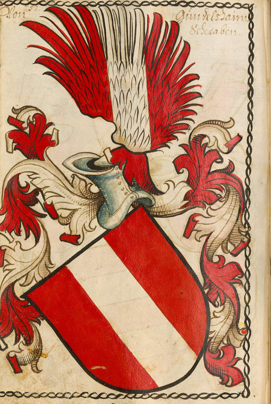 Scheibler'sches Wappenbuch, älterer Teil Seite 252